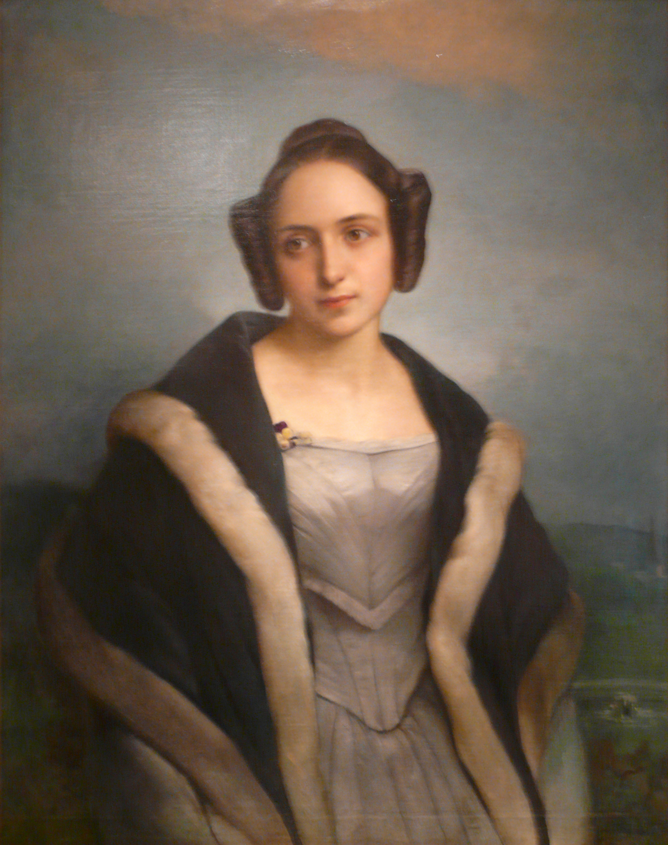 Portret Anny z Sapiehów Czartoryskiej. Kopia według H. Grevedona, 1839 r., olej na półtnie.